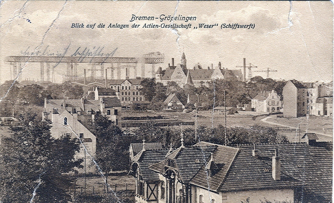 Postkarte, datiert 15.4.1914. Beschriftung: "Bremen-Gröpelingen: Blick auf die Anlagen der Actien-Gesellschaft "Weser" ( Schiffswerft )".